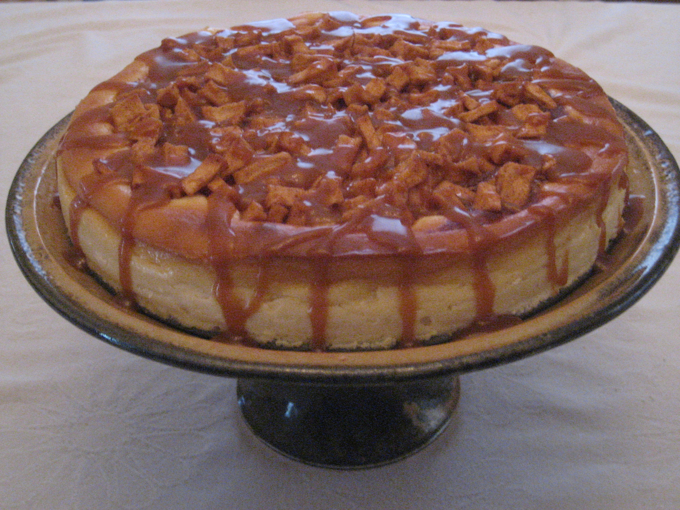 Apple caramel cheesecake